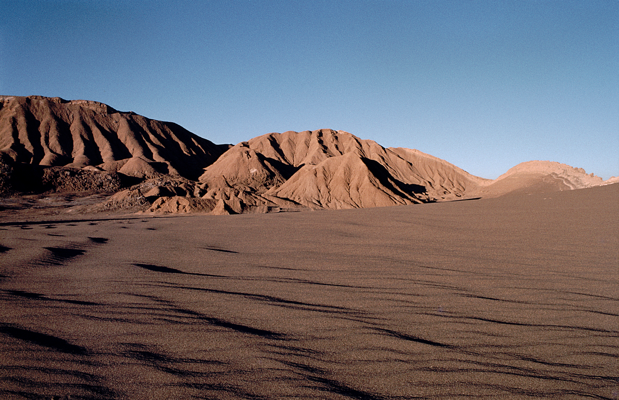 En el Valle de la Luna de la Cordillera de la Sal. San Pedro de Atacama, Chile